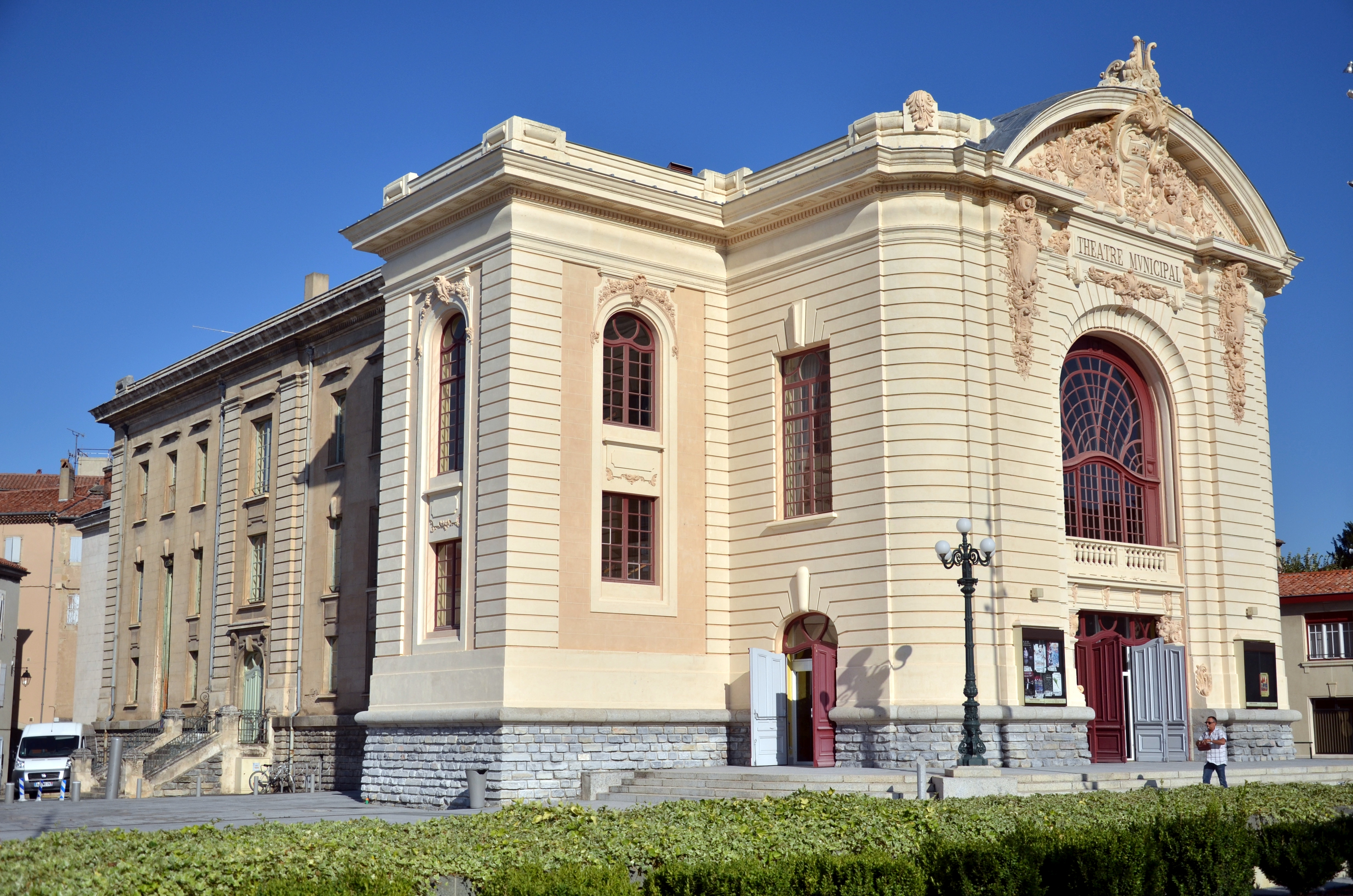 Théâtre municipal de Castres, inauguré en 1904, architecte Joseph Galinier This building is en partie classé, en partie inscrit au titre des Monuments Historiques. .